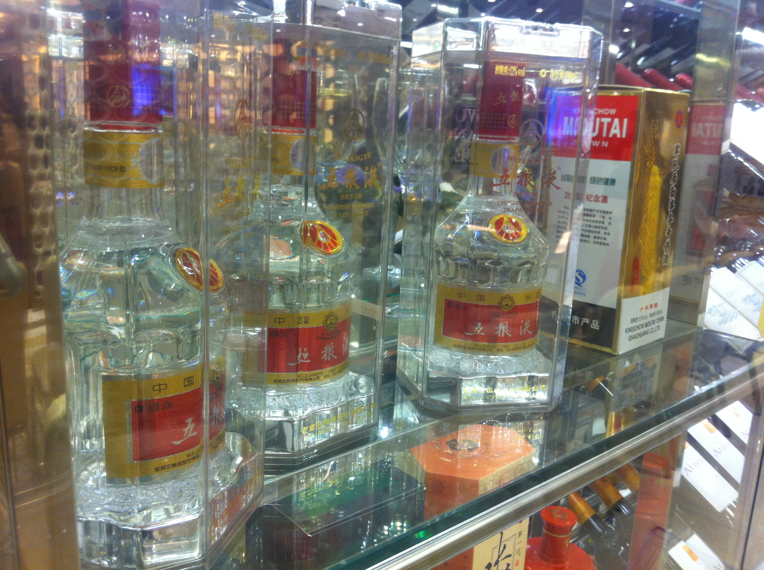 中文（香港）: 寶湖金宴 - 五粮液 Wuliangye Yibin